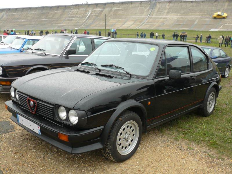 Photo prise à Montlhlery en avril 2012